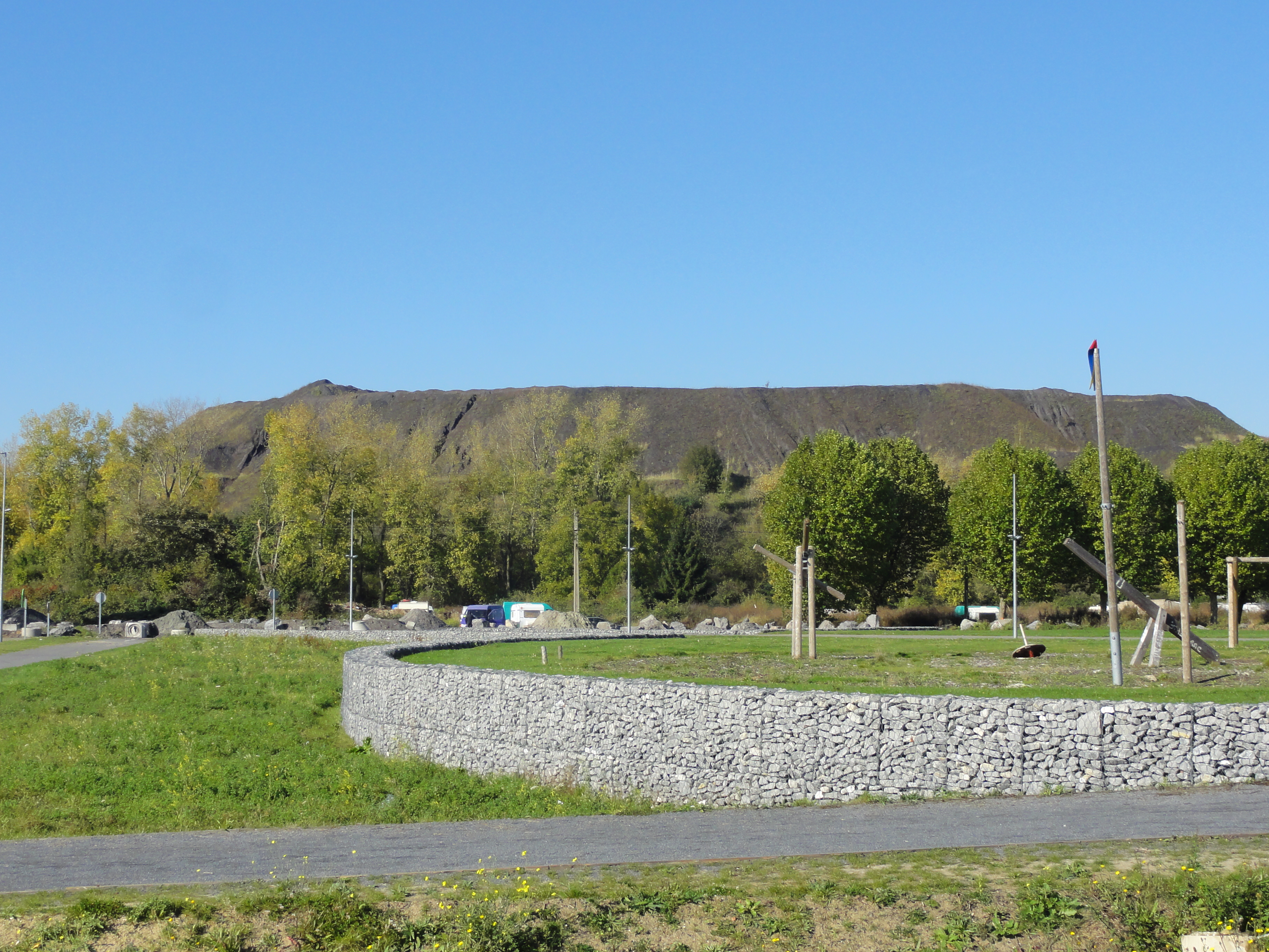 Terril n° 101 dit Lavoir de Drocourt, Lavoir de Drocourt du Groupe d'Hénin-Liétard dans le bassin minier du Nord-Pas-de-Calais, Hénin-Beaumont, Pas-de-Calais, Nord-Pas-de-Calais, France. Le terril no 101 est inscrit sur la liste du patrimoine mondial de l'Unesco le 30 juin 2012 et y constitue en partie le site no 48.